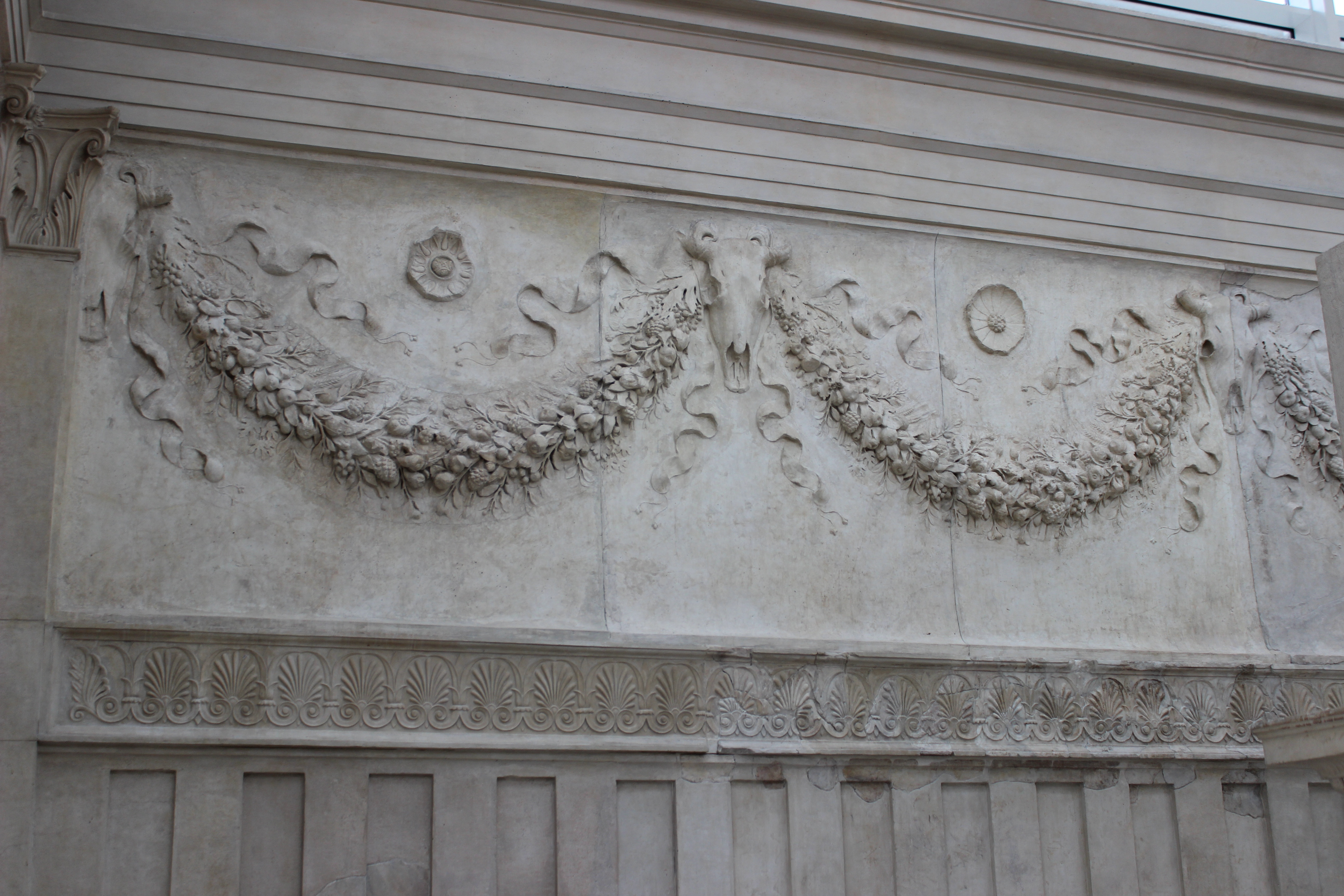 Roma. Ara Pacis. Relieve del interior.